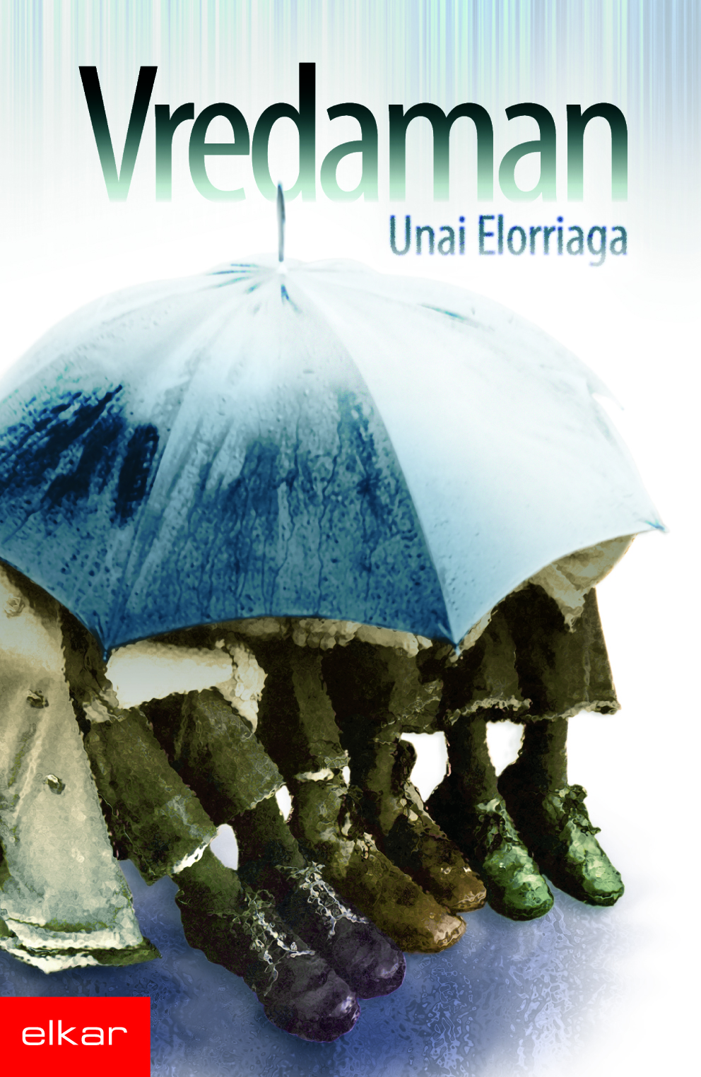 "Vredaman" liburuaren azala. Idazlea: Unai Elorriaga. Azalaren diseinua: Borja Goitia.